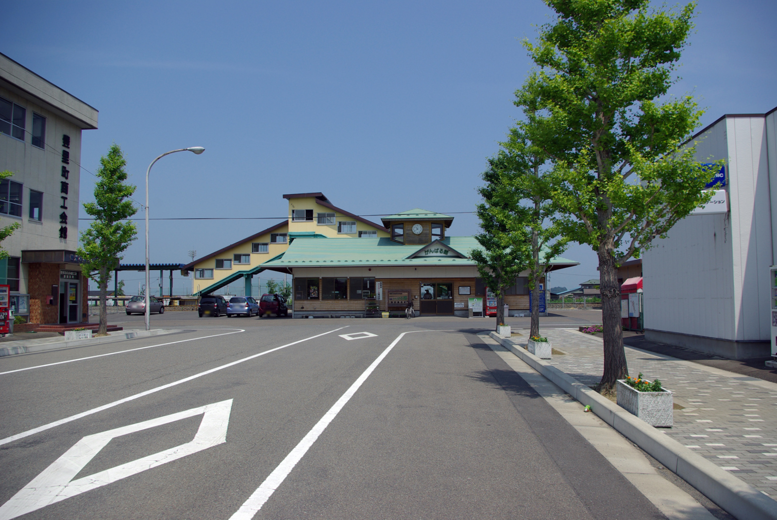 JR気仙沼線陸前豊里駅